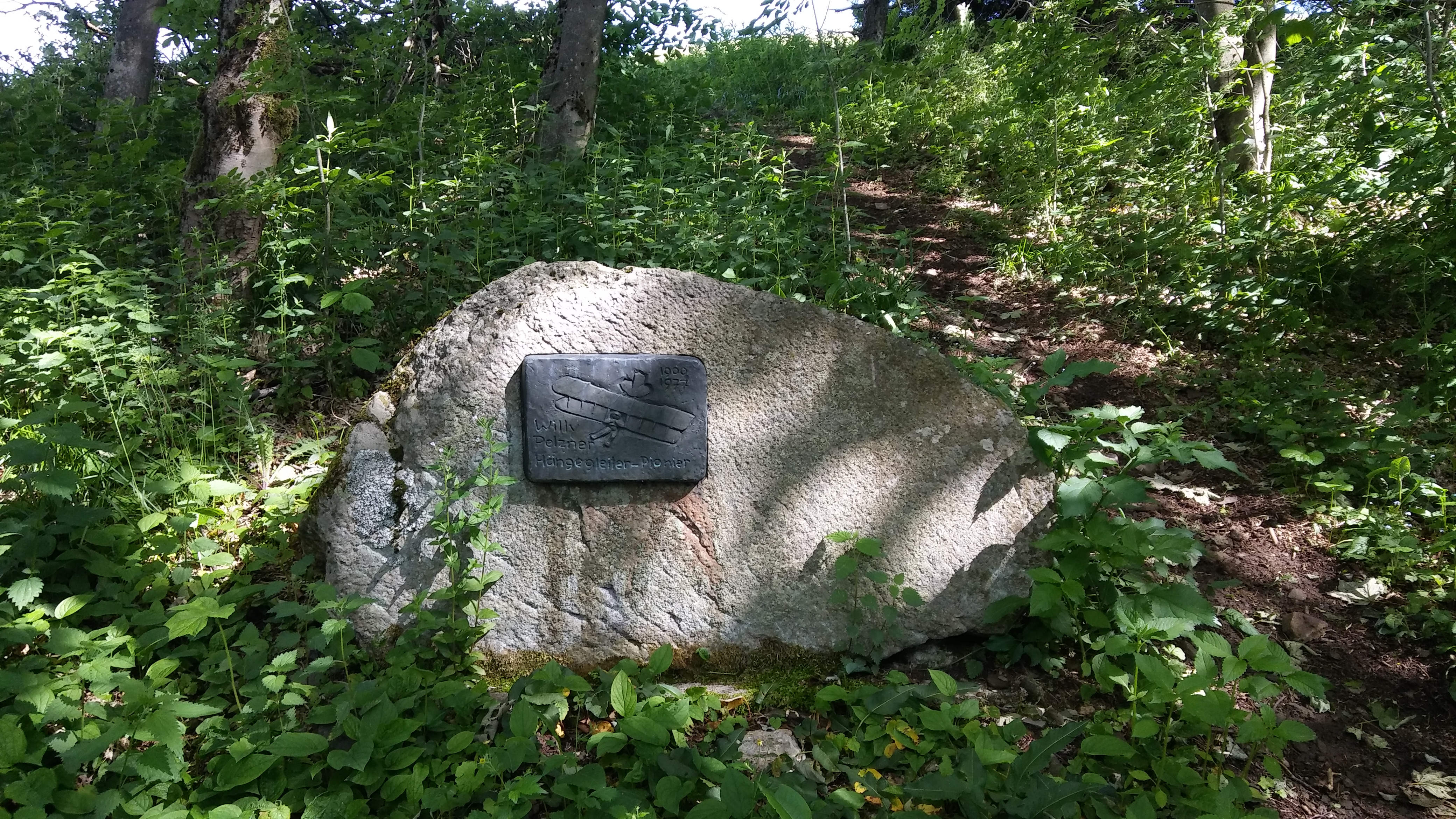 Gedenkstein Willy Pelzner (Hängegleitpionier) 1900 - 1977